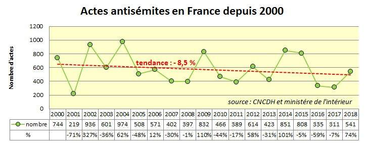 données publiées par la CNCDH parues dans le journal SUD-OUEST du 11/02/2019 ; ajout pourcentages et tendance